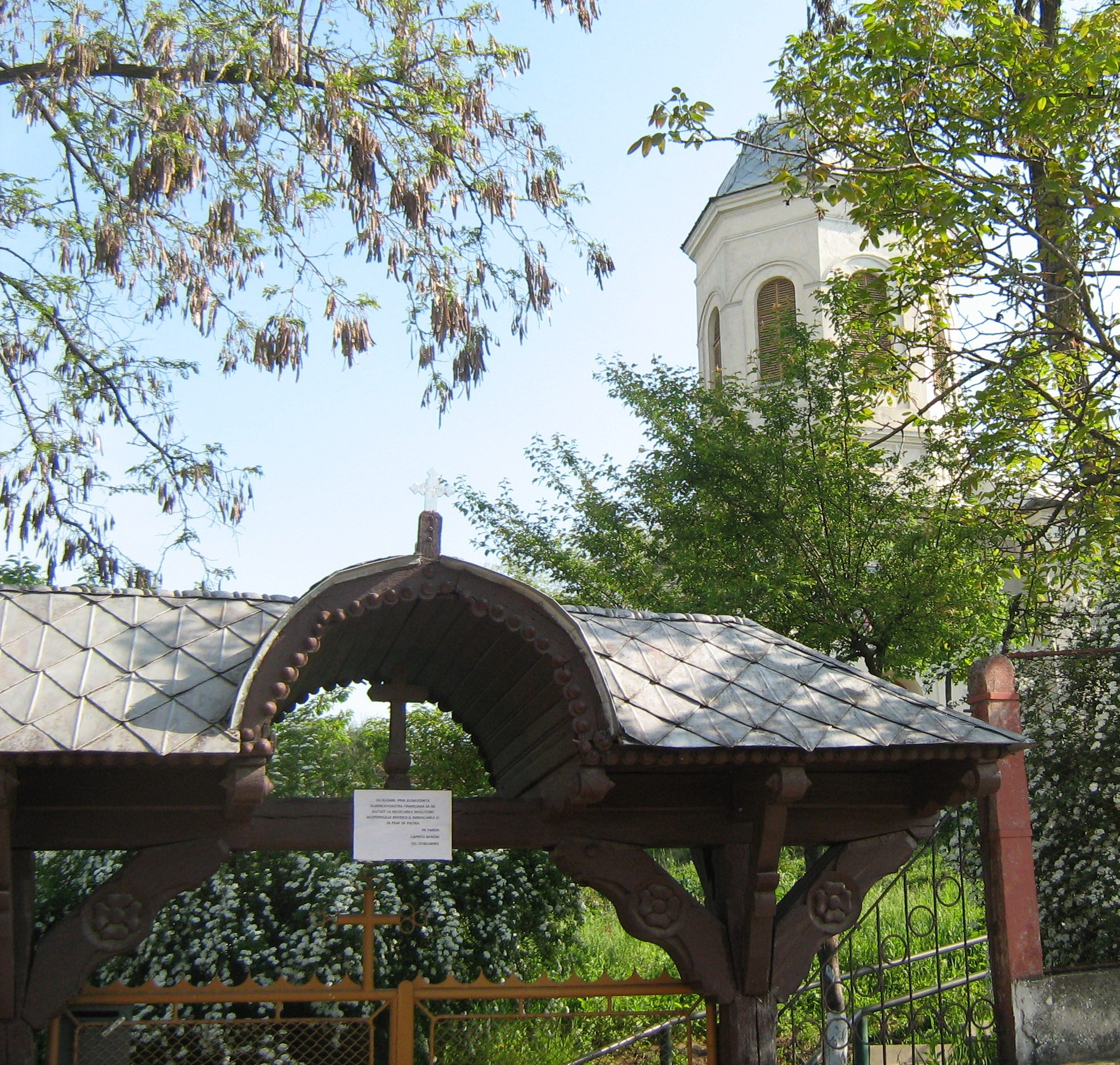 Biserica "Sf. Voievozi"